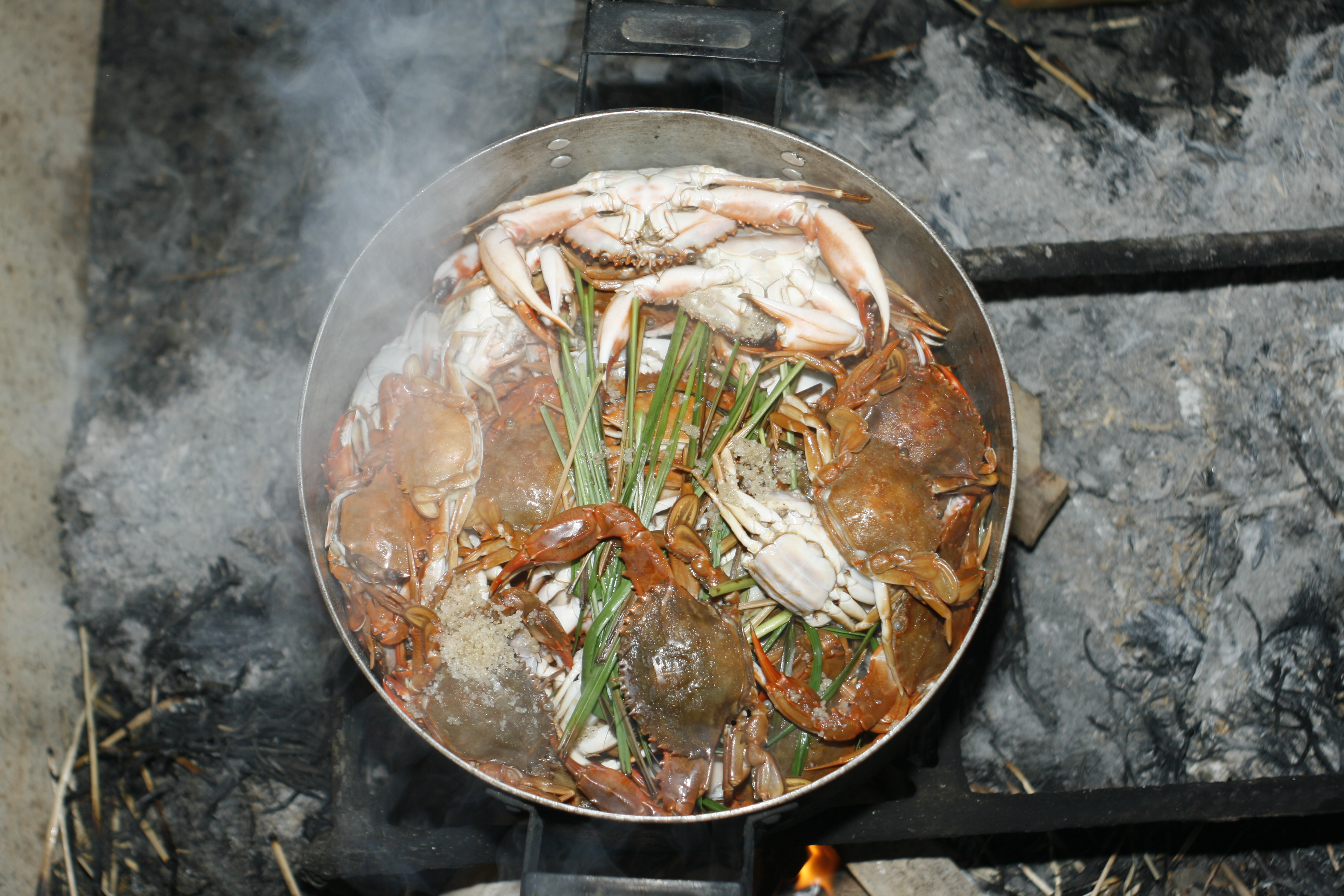 Nồi Ghẹ hấp, nấu theo cách vùng ven biển Hậu Lộc, Thanh Hóa